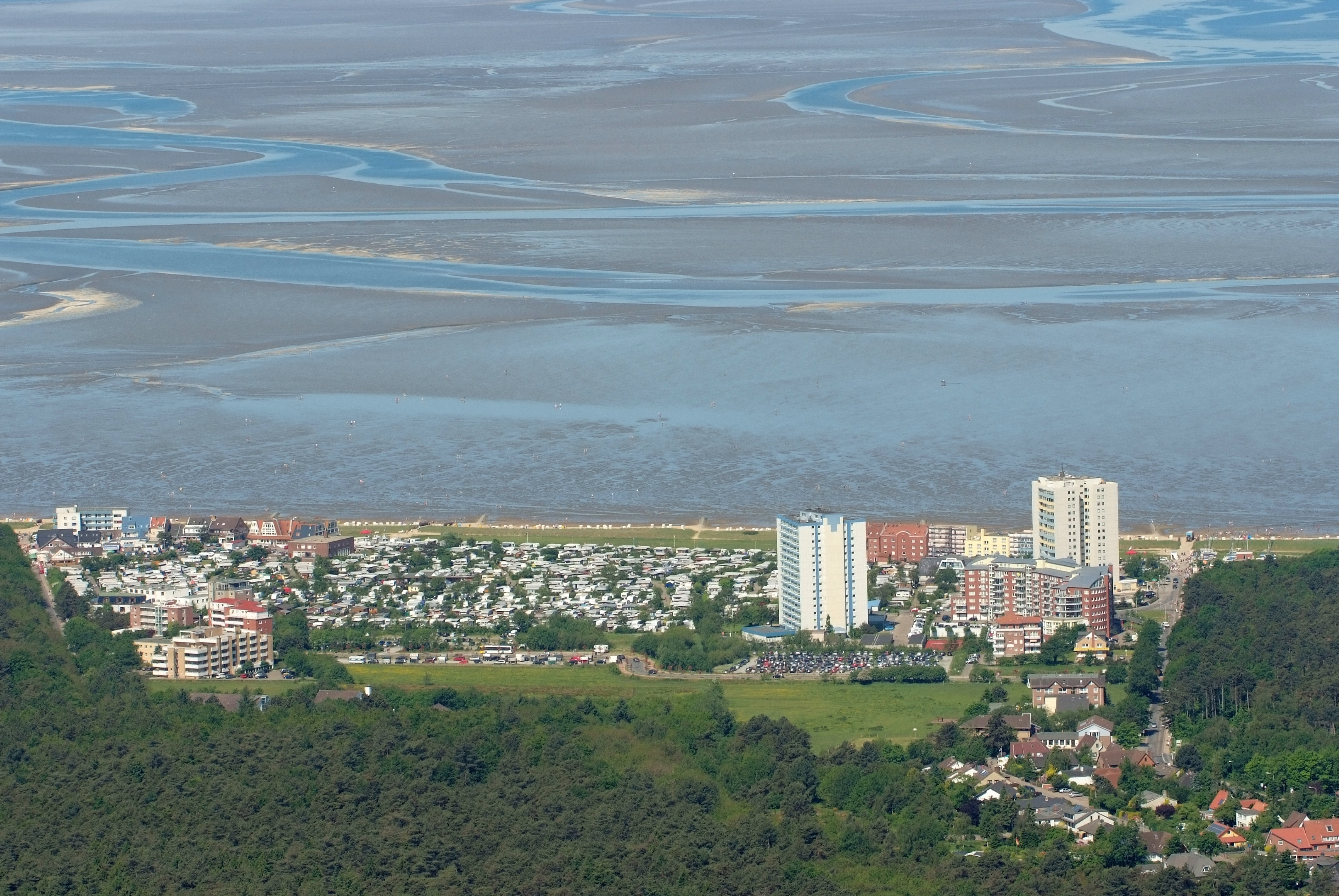 Fotoflug vom Flugplatz Nordholz-Spieka über Cuxhaven und Wilhelmshaven